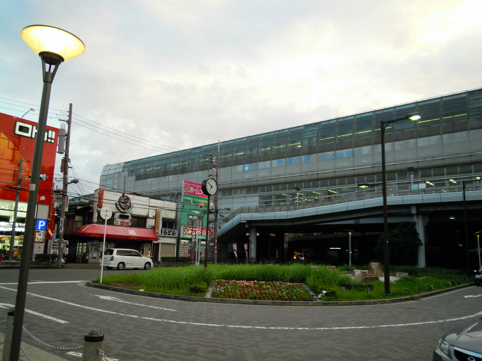 Osaka-monorail Kadoma station